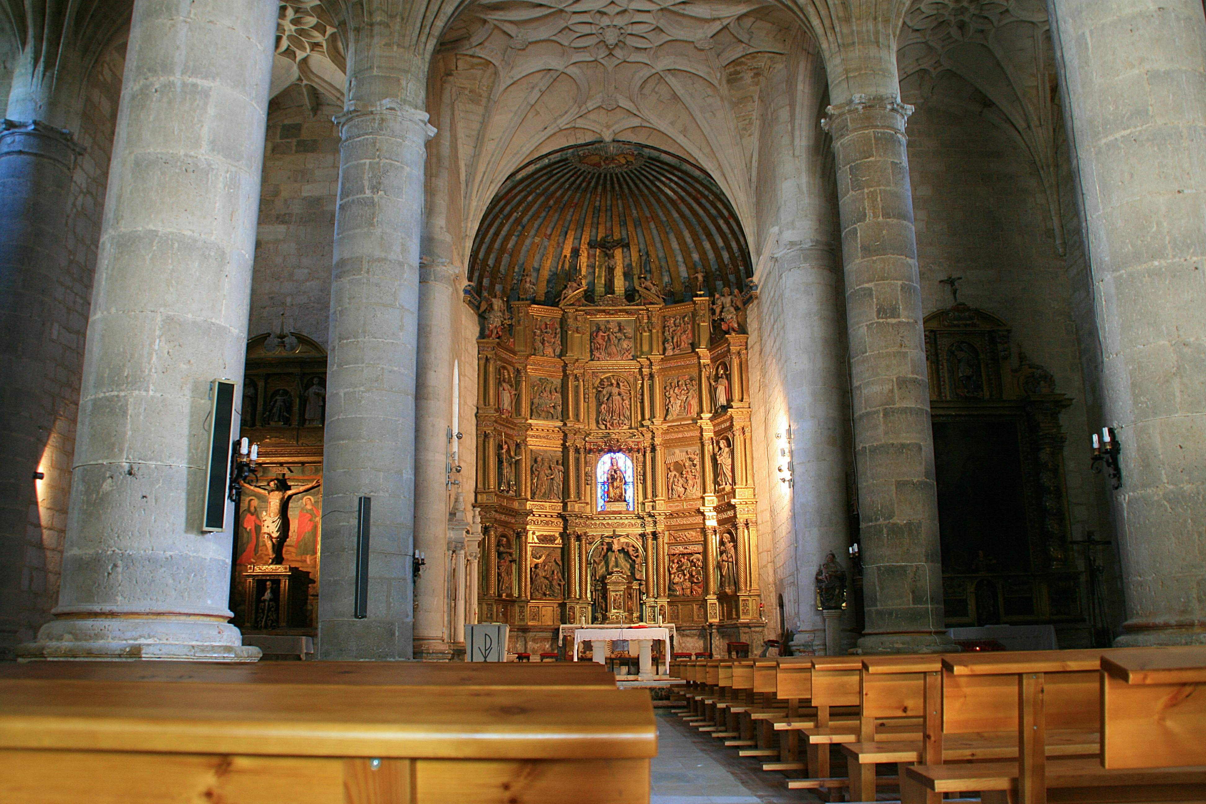 Iglesia de la Asunción de Nª Señora. La construcción de la iglesia de Olmillos de Sasamón se inició hacia 1522. En su construcción se sigue un concepto renacentista del espacio, interpretado a través de estructuras góticas, con naves a la misma altura cubiertas con bóveda de crucería ricamente nervada. Es un templo de salón, de tres naves, con seis pilares cilíndricos. La torre data de 1618 y es obra de García de Arce, hijo, de estilo herreriano con remate en bolas. La cúpula superior superpuesta es contemporánea, construida para evitar el derrumbamiento de la torre. El reloj es de fines del siglo XVII. El retablo se empieza a levantar en 1654 por los imagineros Juan de Pobes y Juan de los Helgueros.